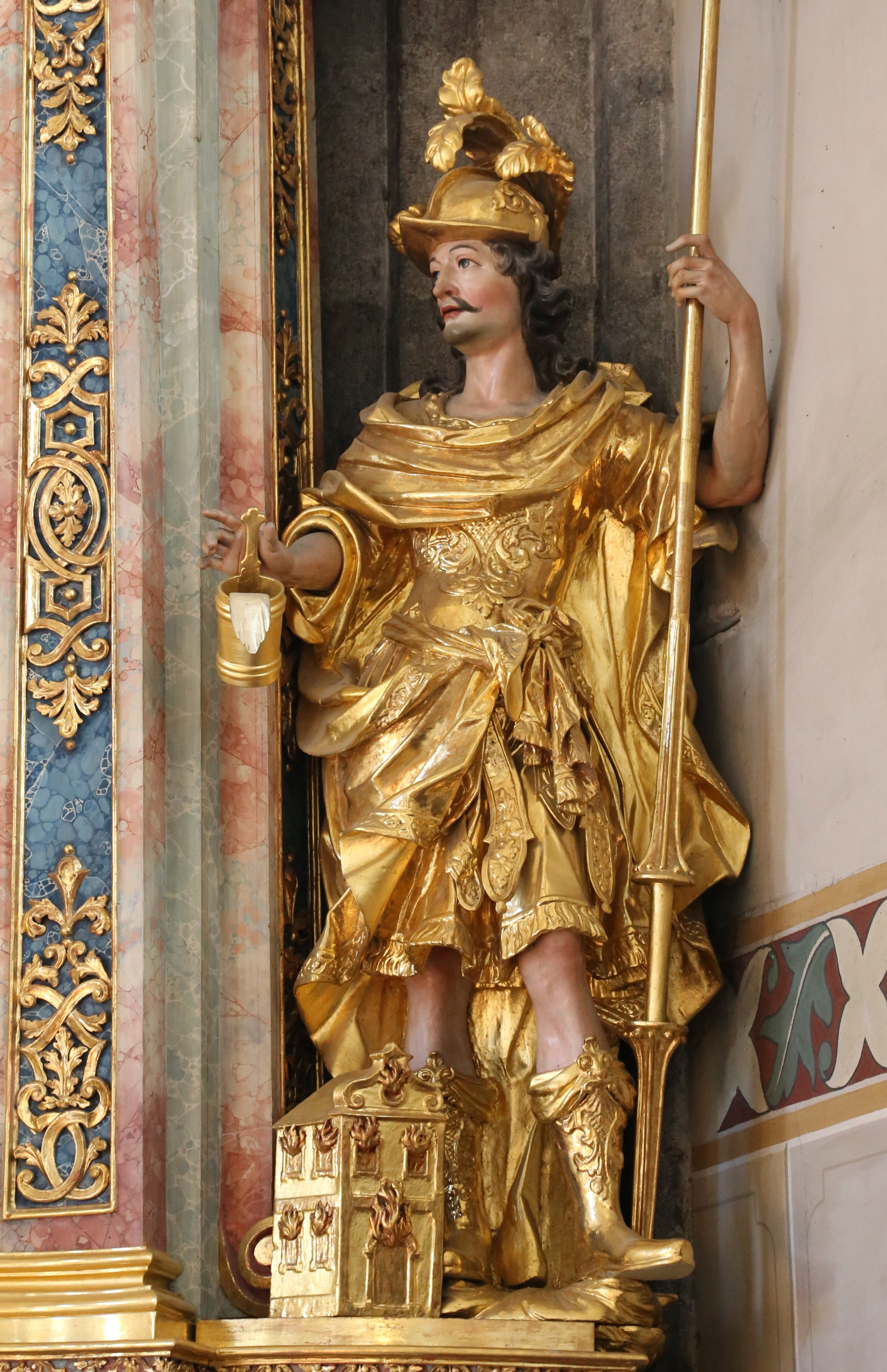 Kath. Pfarrkirche Mariae Himmelfahrt, Schwaz; St.-Anna-Altar, rechter Seitenaltar This media shows the remarkable cultural object in the Austrian state of Tyrol listed by the Tyrolean Art Cadastre with the ID 12394. (on tirisMaps, pdf, more images on Commons)